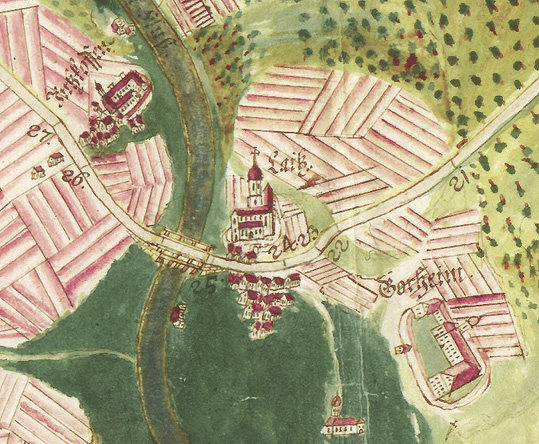 Inzigkofen, Laiz (heute zu Sigmaringen) und Kloster Gorheim (heute zu Sigmaringen) Detail aus einer Karte der Straße von Ebingen über Winterlingen und Laiz nach Meßkirch, um 1788 Collection: Staatsarchiv Sigmaringen; K I SIG/10